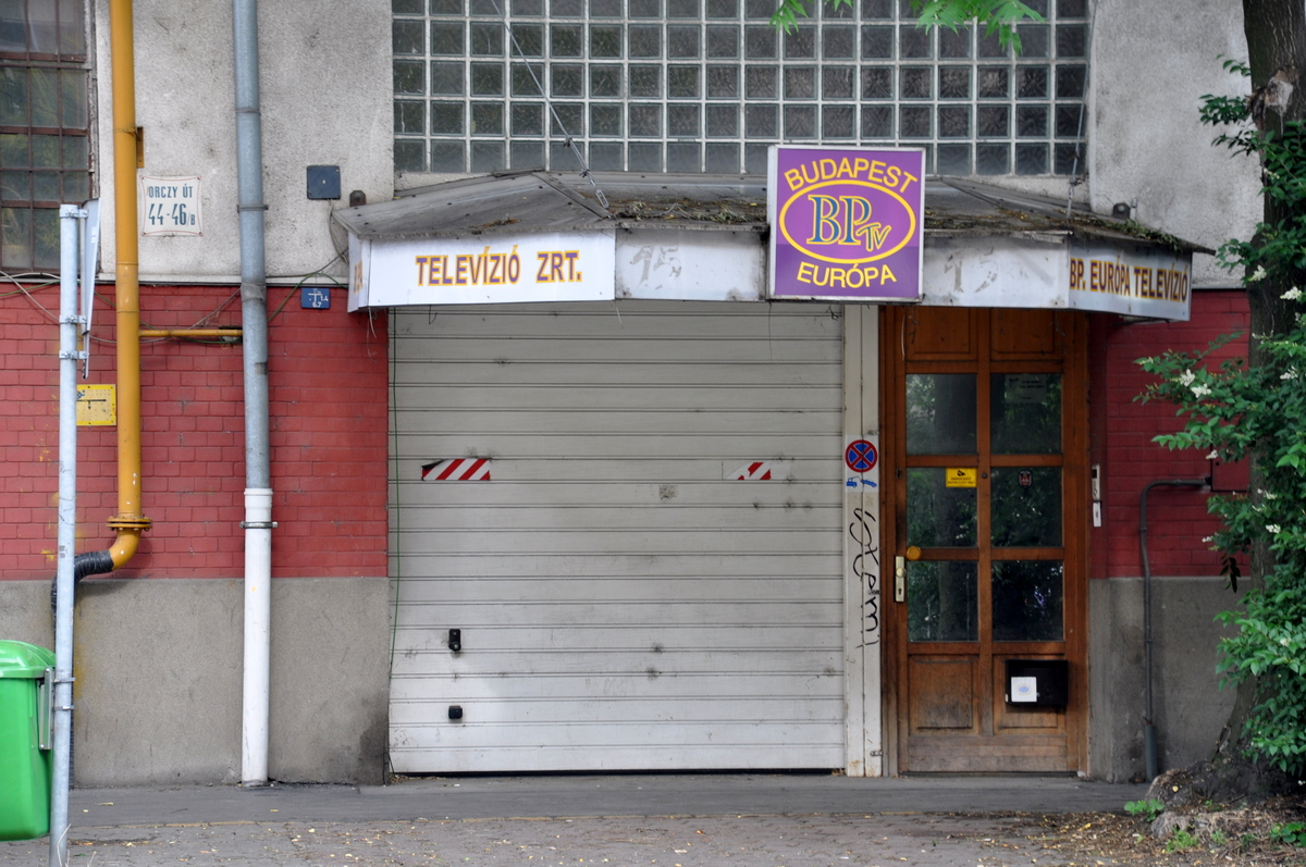 Budapest TV building, Orczy út 44-46, Budapest